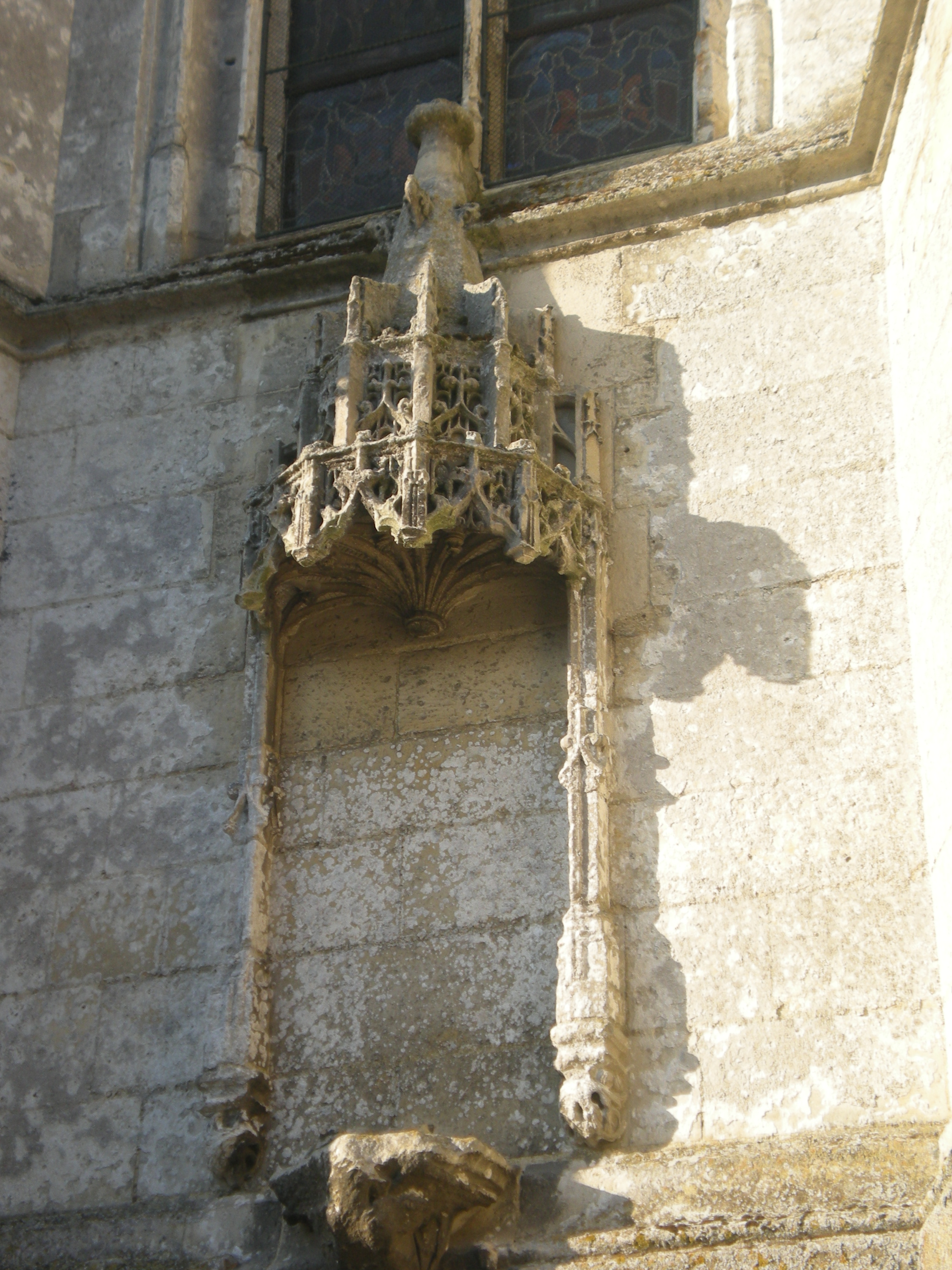 une sculpture sur le chevet de l'église saint léger d'agnetz